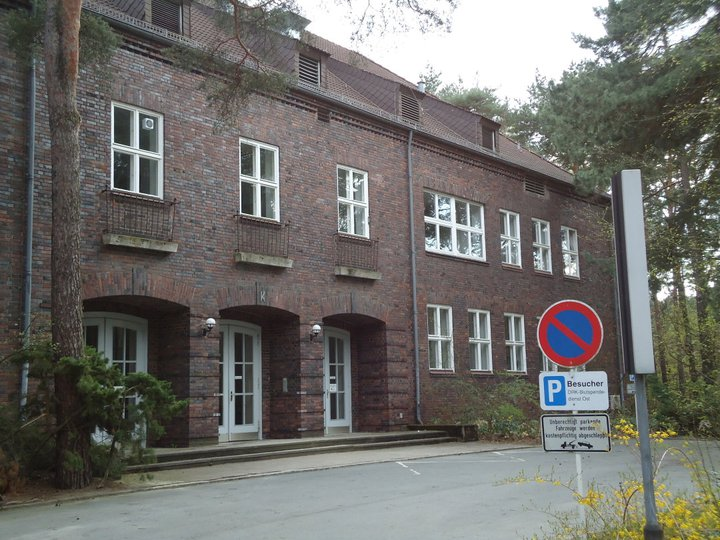 Gebäude der ehemaligen Reichsluftschutzschule